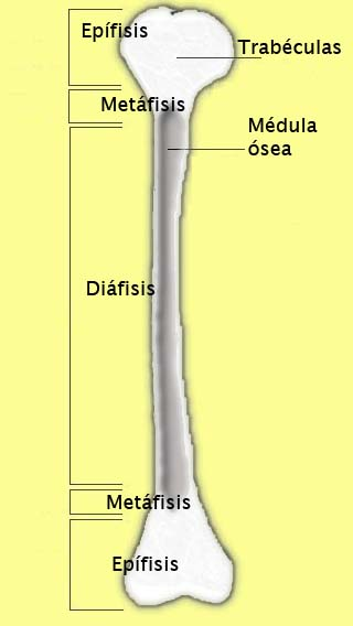 Representación de un hueso (húmero) como ejemplo para ilustrar sus partes principales.